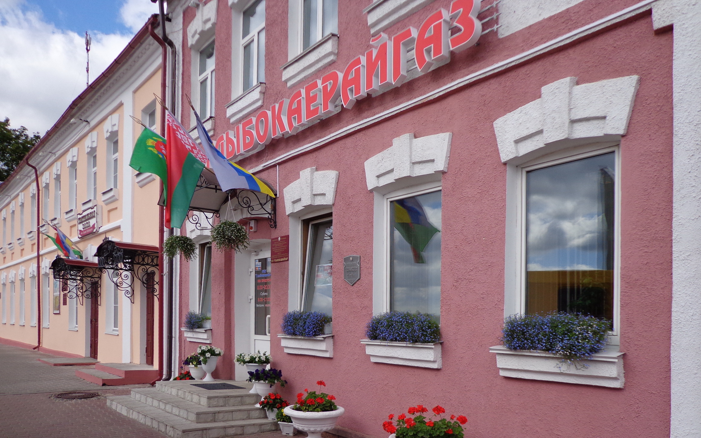 GLUBOKOE. LENINA Str / ГЛЫБОКАЕ. Вулiца ЛЕНIНА.